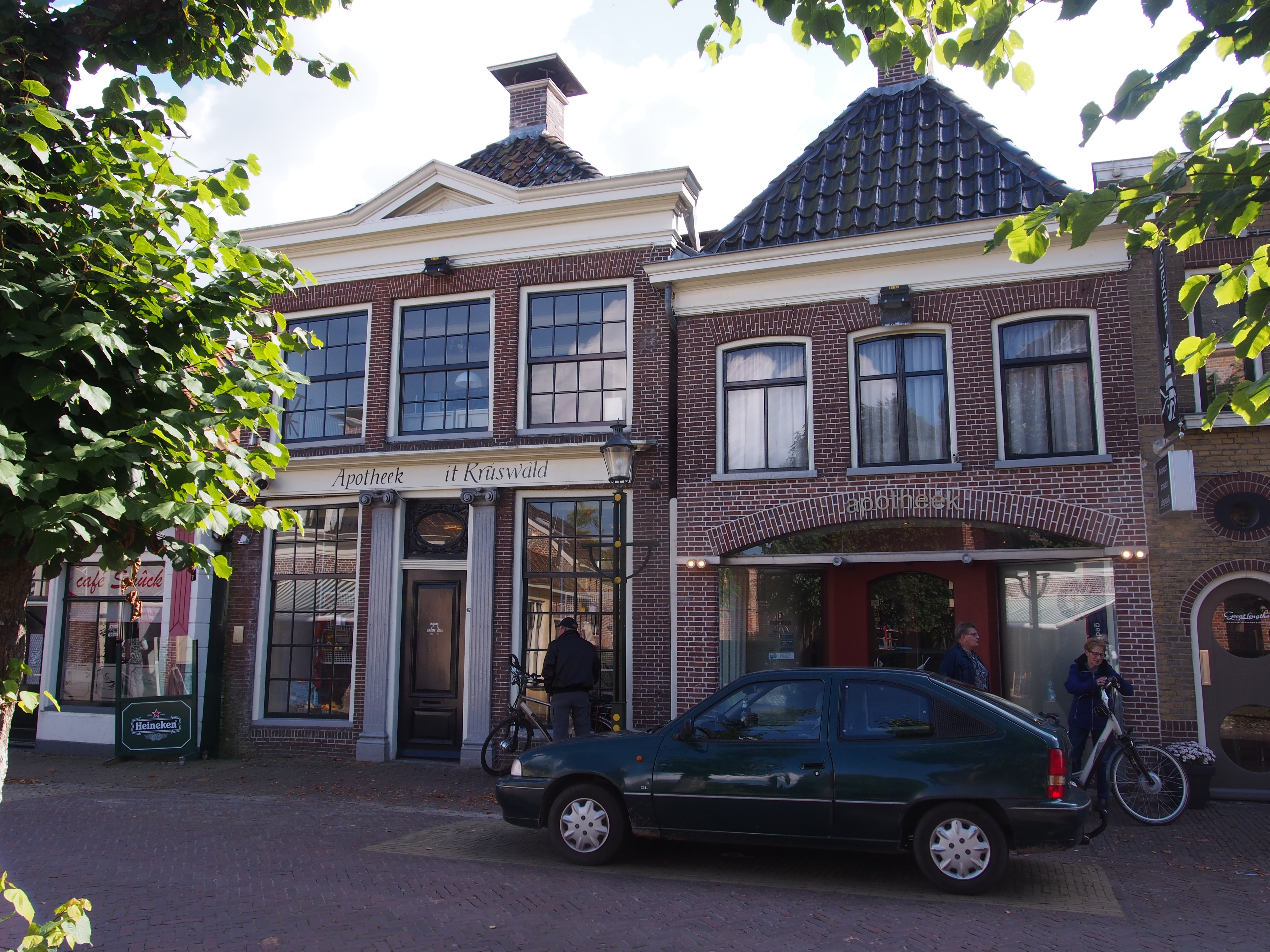 Apotheek It Krúswâld, Voorstraat 62, Kollum